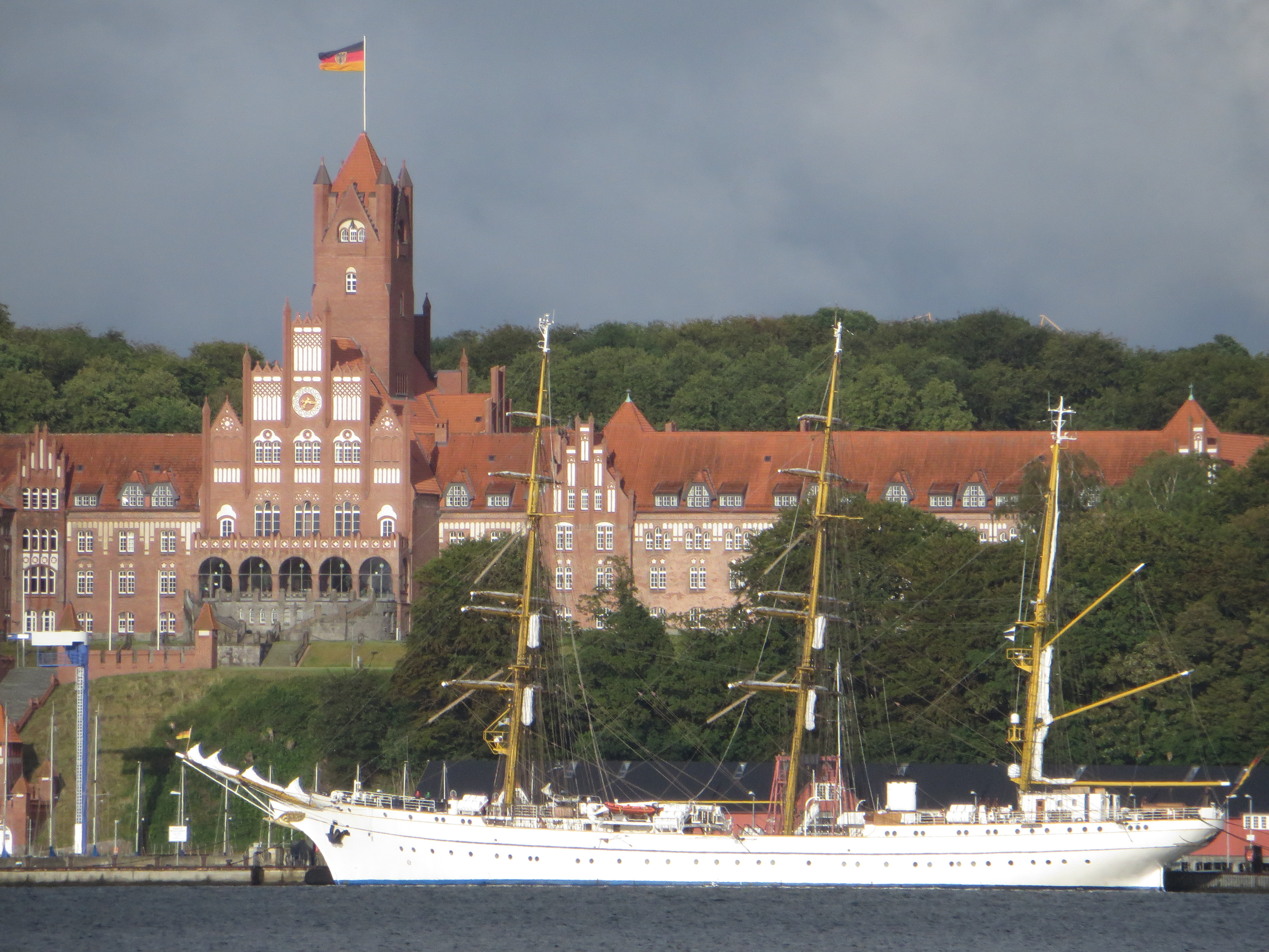 Gorch Fock direkt vor der Marineburg (Flensburg-Mürwik Juli 2015), Bild 06